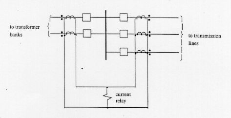 фиг.2 Диференциална защита на шинни системи